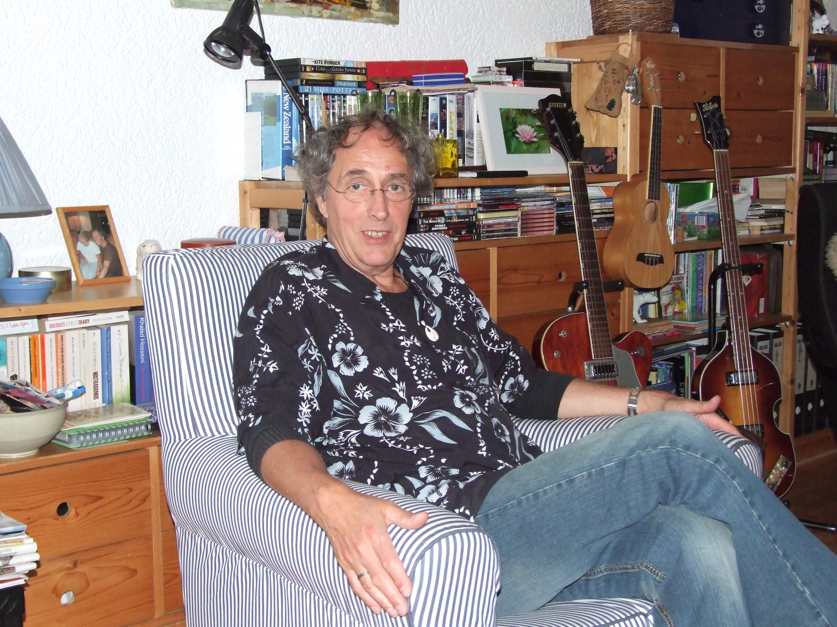 Nederlands popmuzikant